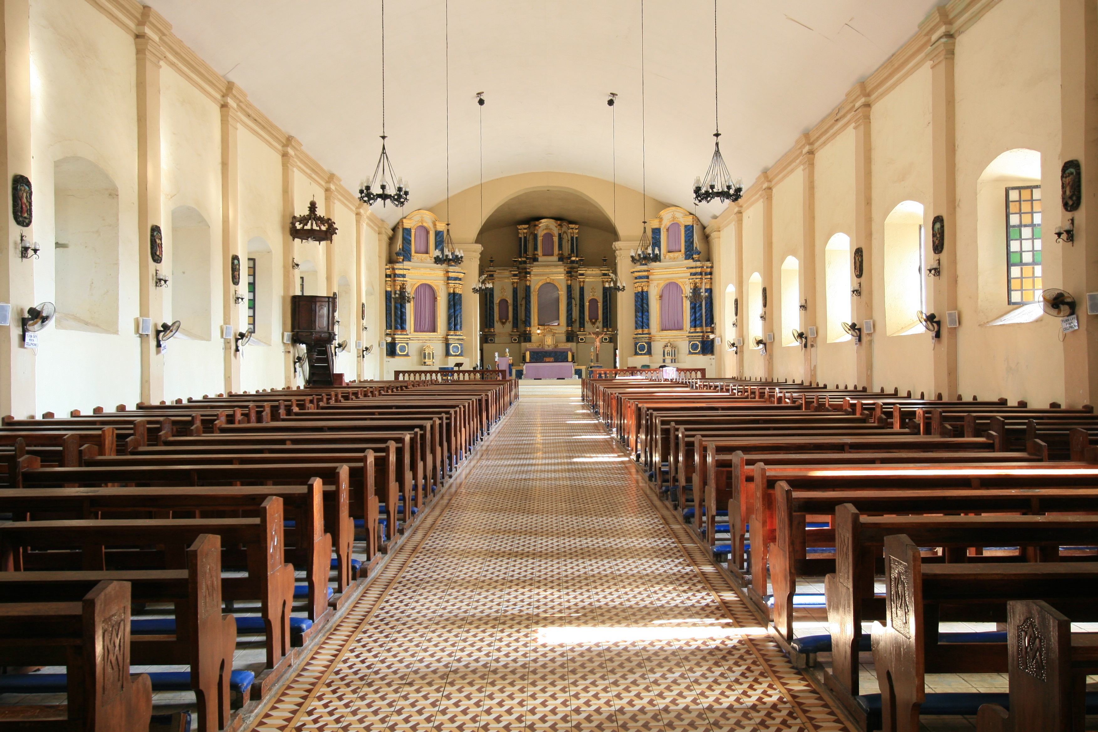 Inside of Santa Maria Church, Santa Maria, Ilocos Sur, Philippines